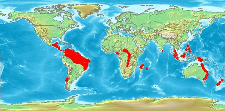 Monimiaceae área de distribución la familia